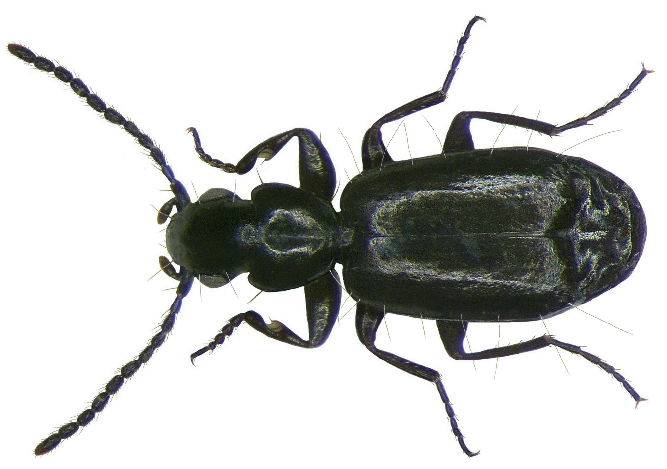 Familie: Carabidae Größe: 2,2-2,9 mm Verbreitung: Europa, über Kleinasien bis Westasien Ökologie: in trockenen und warmen Biotopen Fundort: Germania, Oberfranken, Kulmbach leg.det. U.Schmidt, 1983 Foto: U.Schmidt, 2008